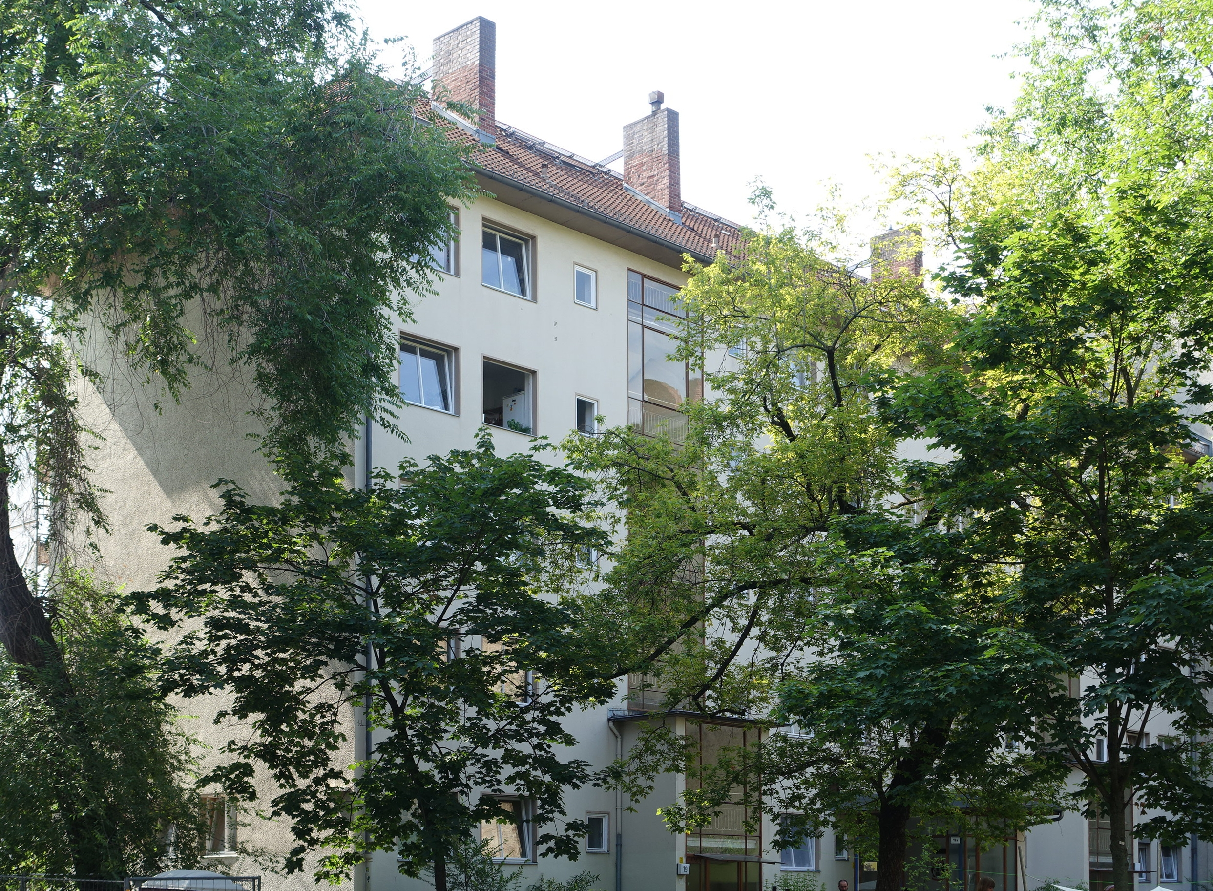 Mietshaus